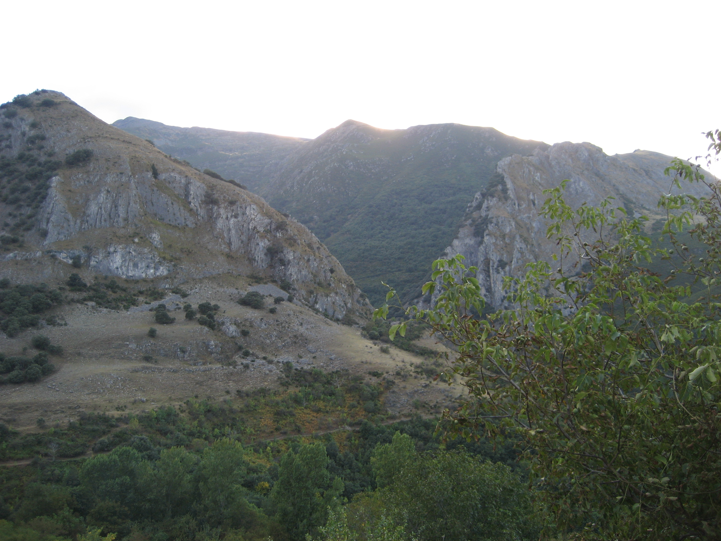 Entrada al Valle del Silencio vista desde Santiago de Peñalba (León, España).